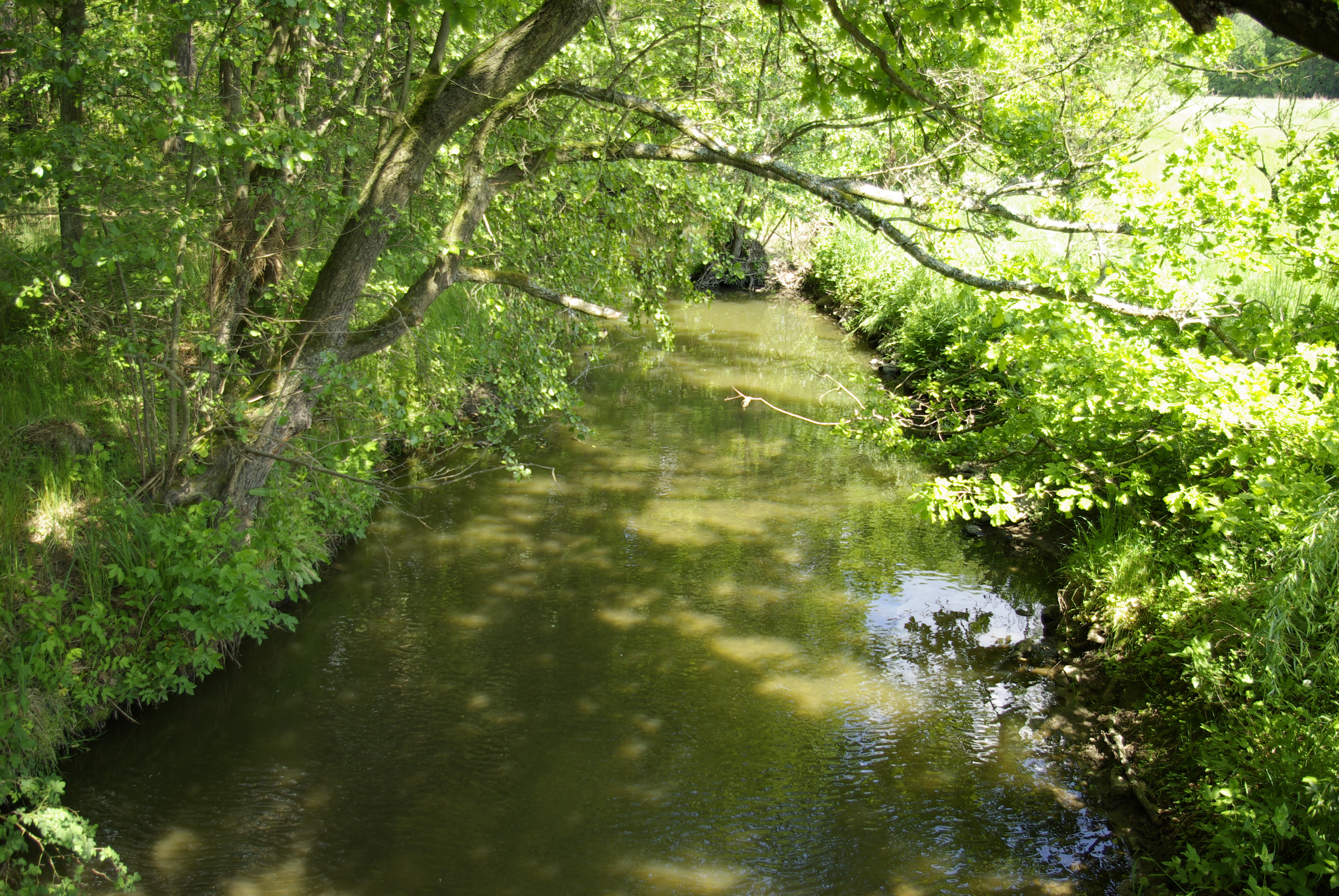 Die Seebach im Landschaftsschutzgebiet Seebachgrund südlich des Waldgebietes Dechsendorfer Lohe im Erlanger Stadtteil Dechsendorf.